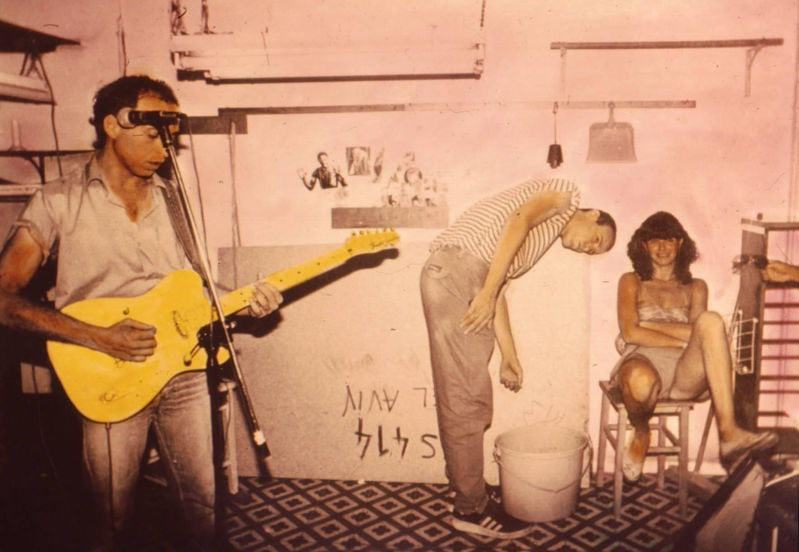 דורון אייל עם רמי פורטיס ורונה ורד